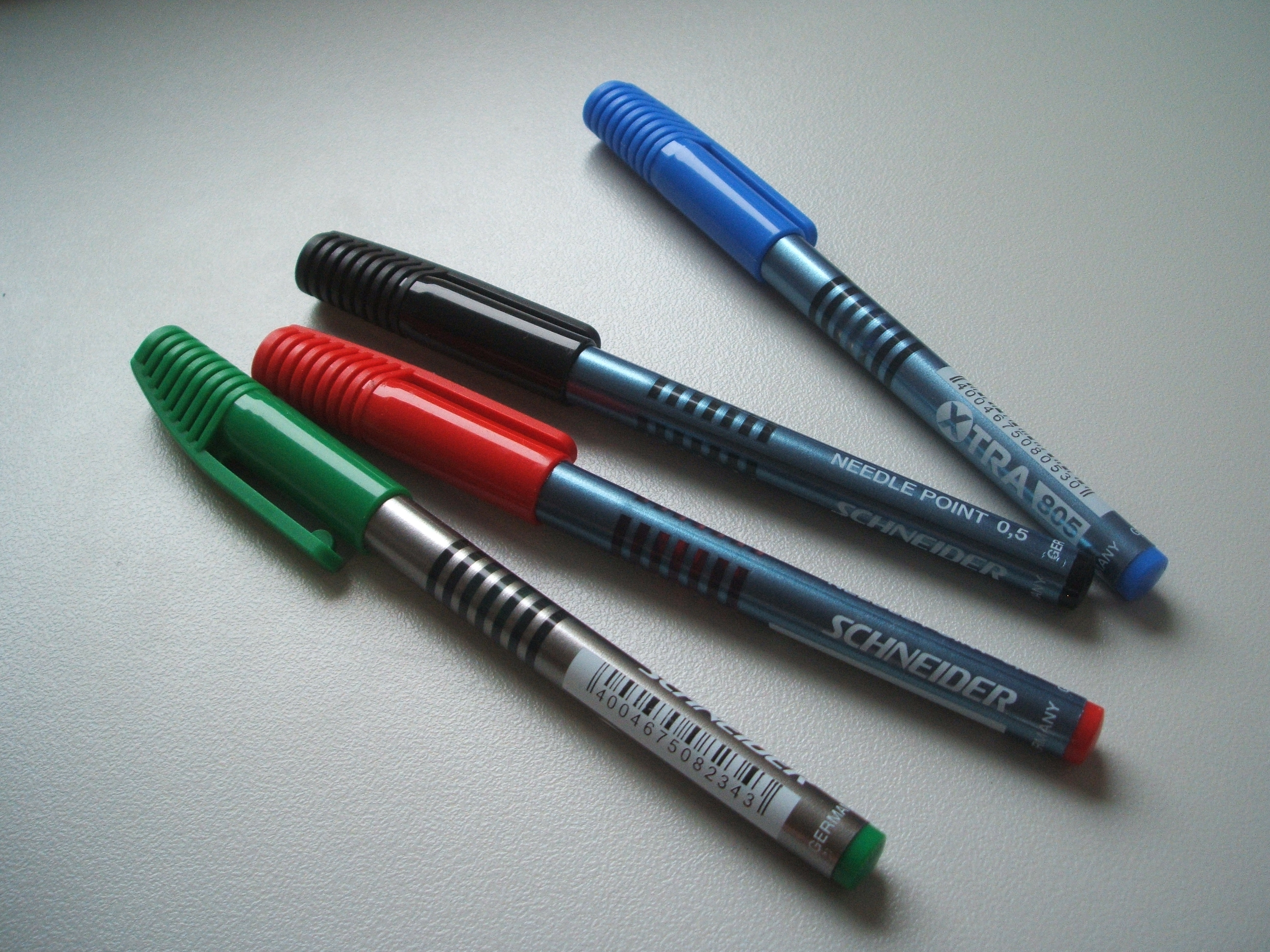 Ball Point Pens der Firma Schneider Schreibgeräte in grün, rot, schwarz und blau 2007